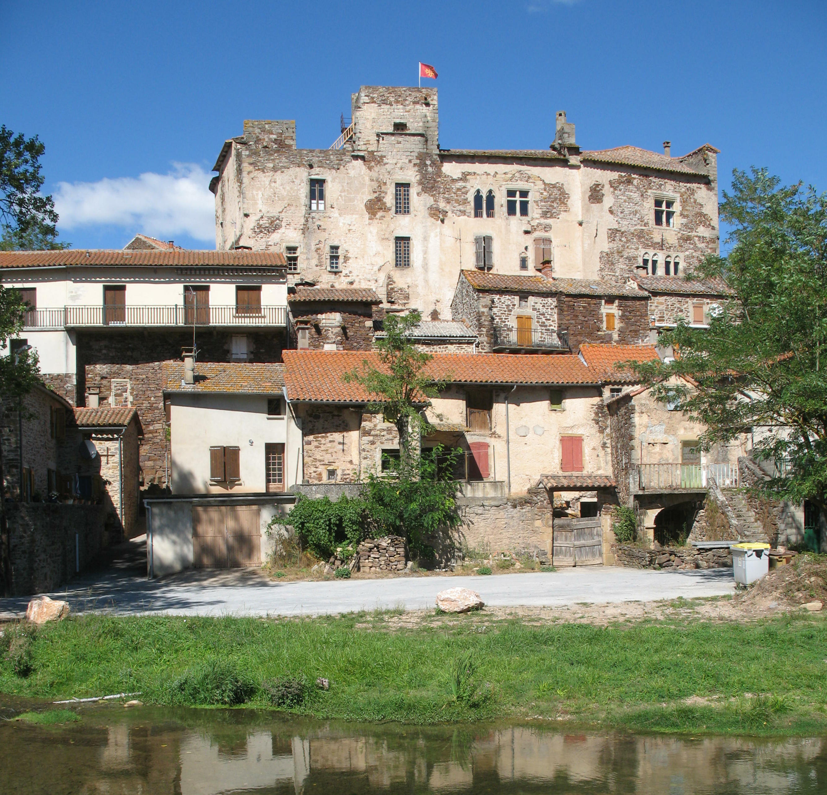 Château de Latour, à Marnhagues-et-Latour, dans l'Aveyron.